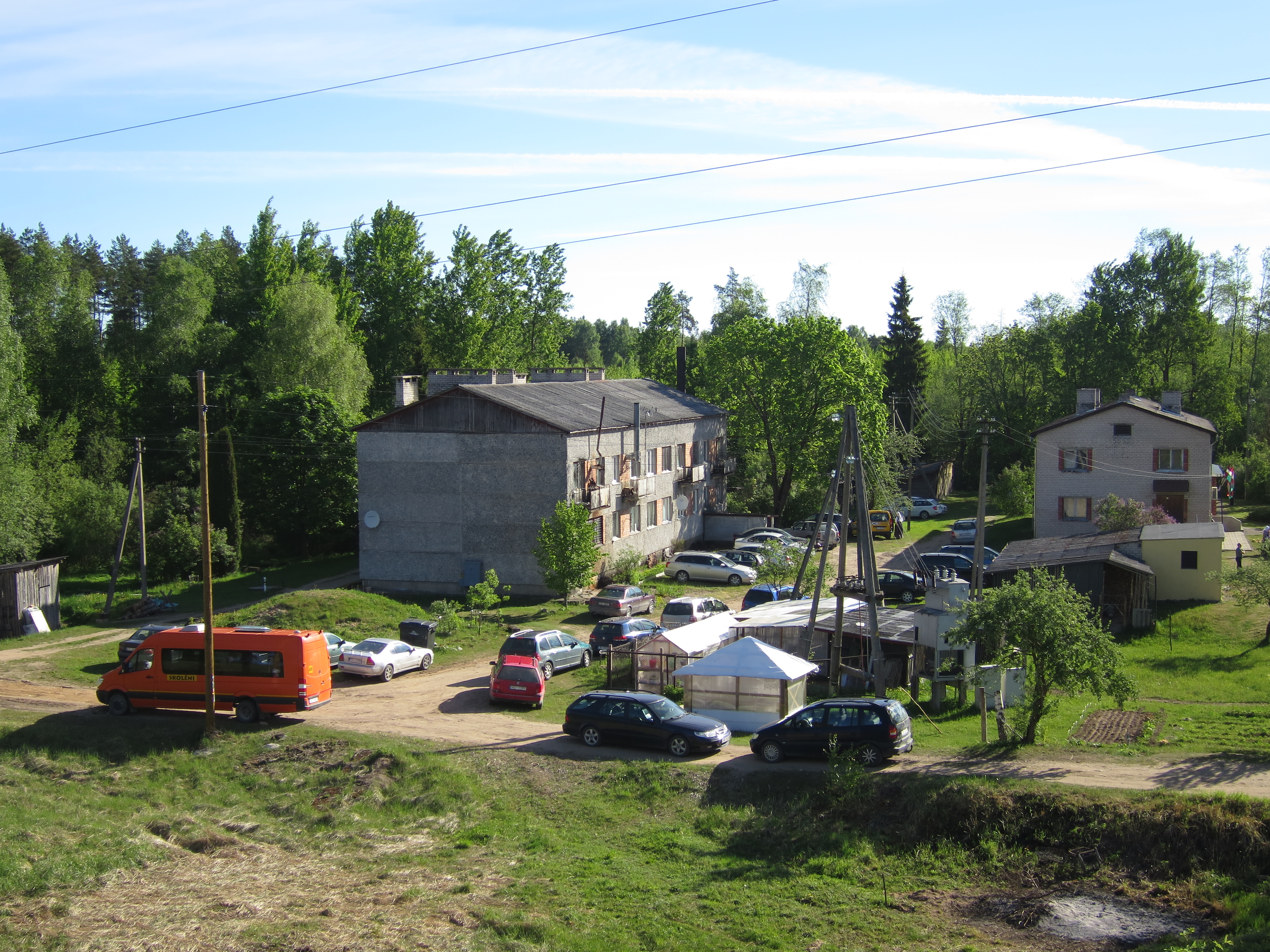 Daugavas stacijas ciems. Pa kreisi ēka "Daugavas stacija 3", pa labi Daugavas dzelzceļa stacijas ēka.